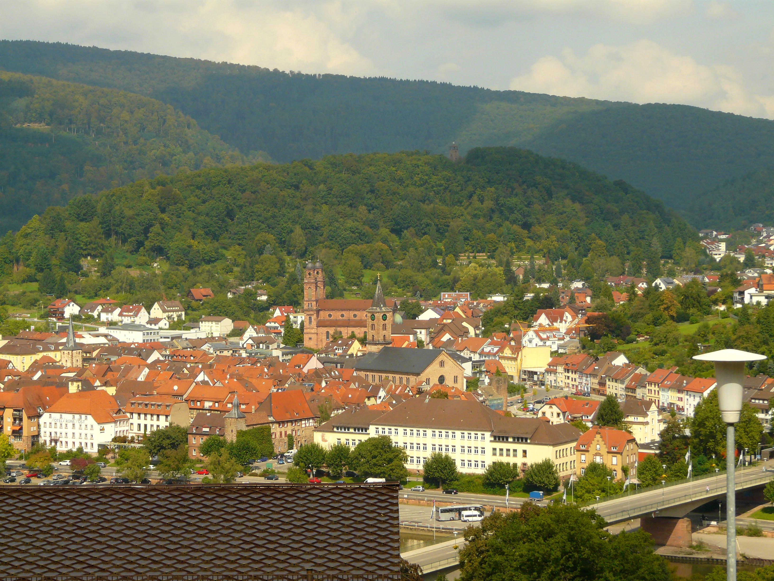 Blick vom "Böser Berg" oberhalb von Neckarwimmersbach auf Eberbach